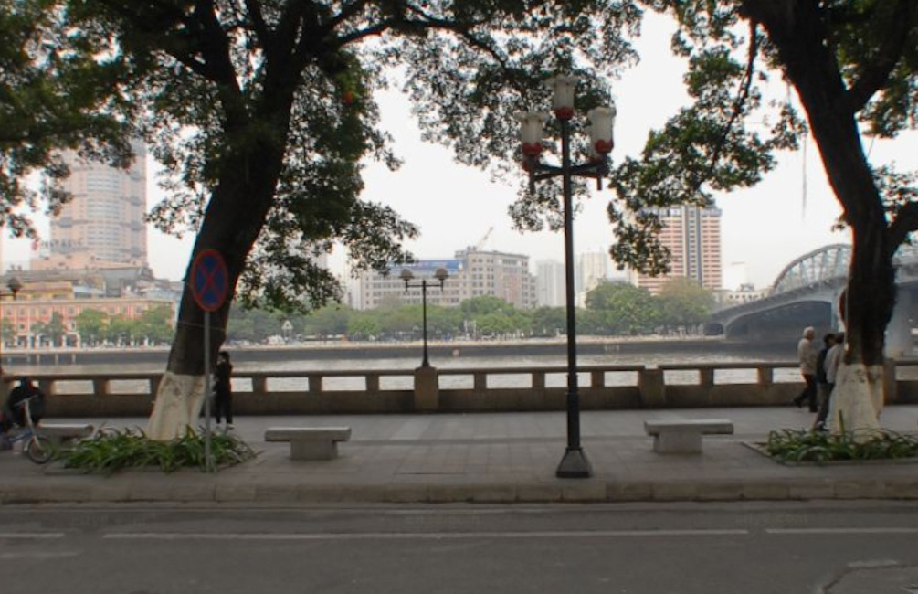 中文（中国大陆）: 滨江路，广州